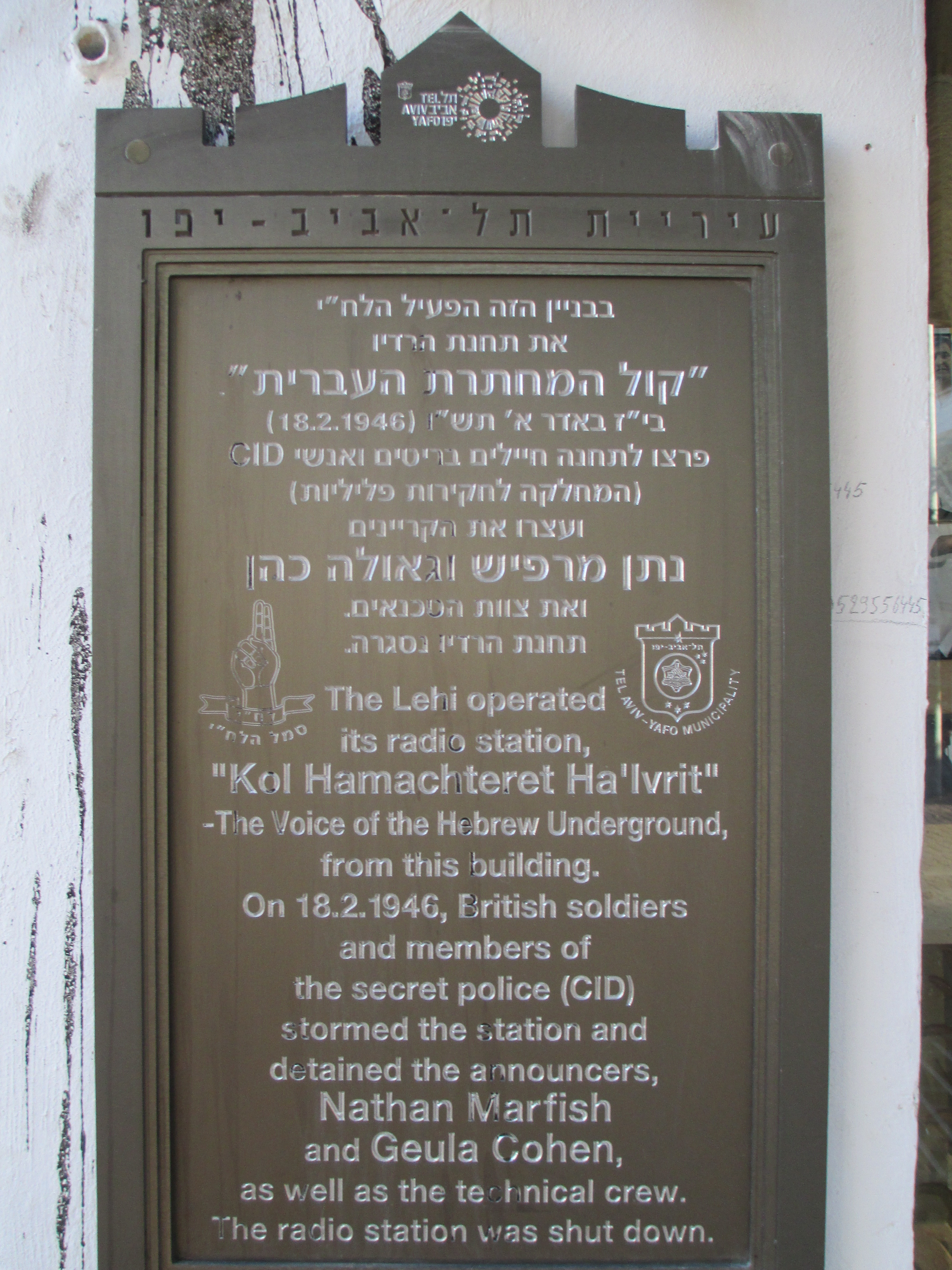 לוחית זיכרון לתחנת השידור של לח"י בה נתפסה ונעצרה גאולה כהן